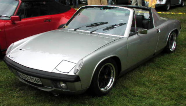 Volkswagen-Porsche 914/6